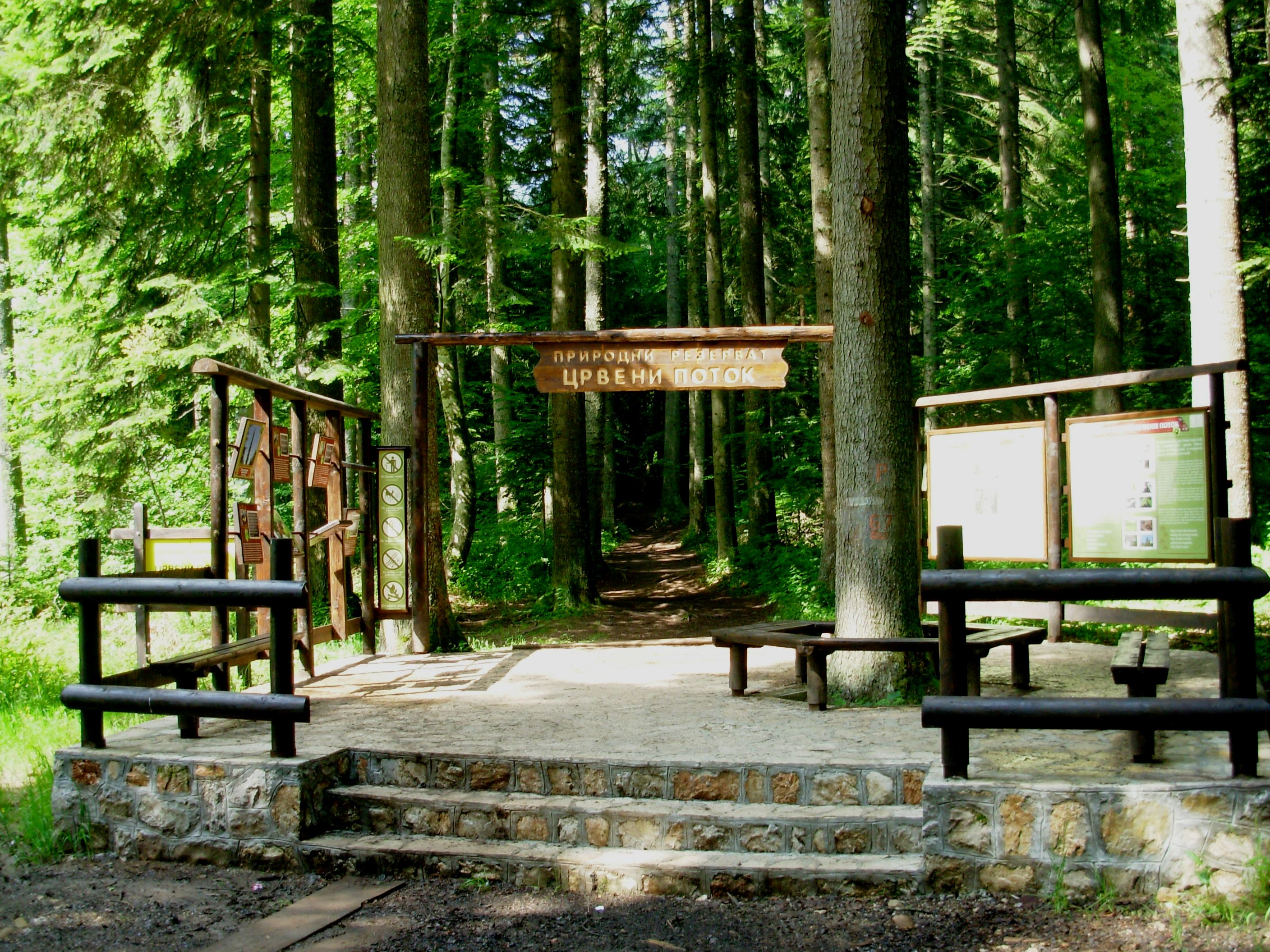 Улаз у резерват "Црвени поток" код Митровца на Тари. Сликао Голдфингер